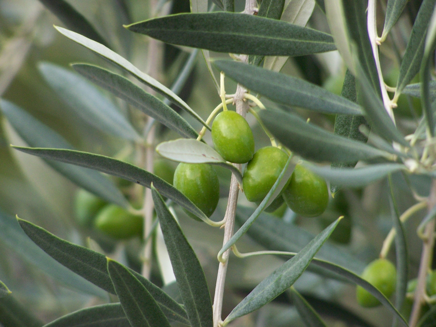 Pormenor de uma oliveira em Melo, Serra da Estrela, Portugal